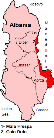 Mala Prespa and Golo Brdo, from en.wp